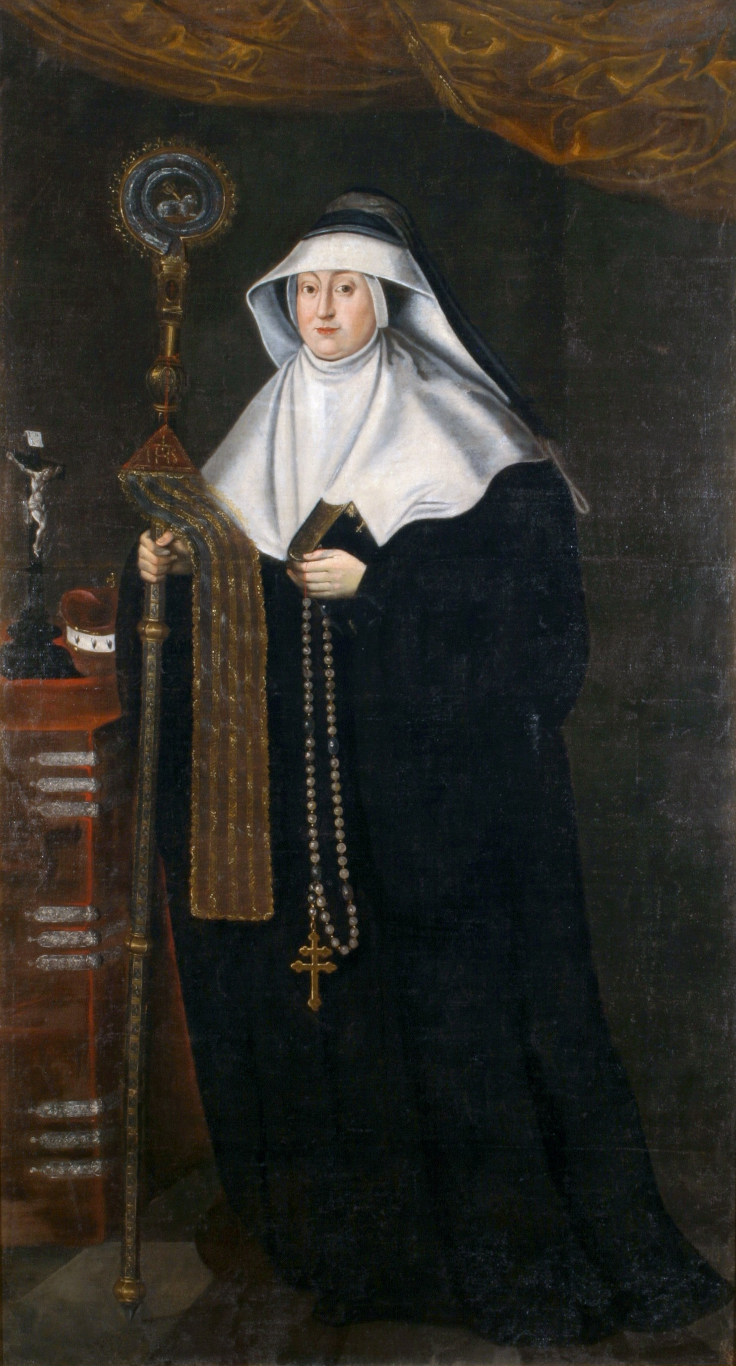 Беларуская (тарашкевіца): Партрэт Крыстыны Яўхіміі Радзівіл (Krystyna Jaŭchimija Radzivił)